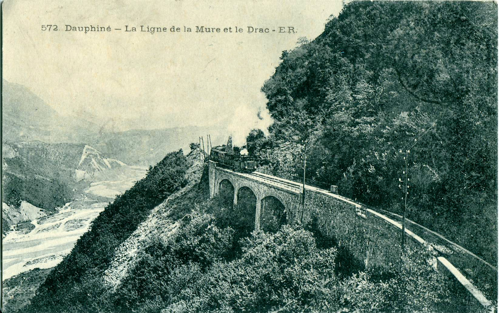 Carte postale ancienne éditée par ER, N° 572 DAUPHINÉ : La Ligne de la Mure et le Drac On voit un train tracté par une locomotive à vapeur. Le cliché est donc antérieur à 1912, année de l'électrification de la ligne